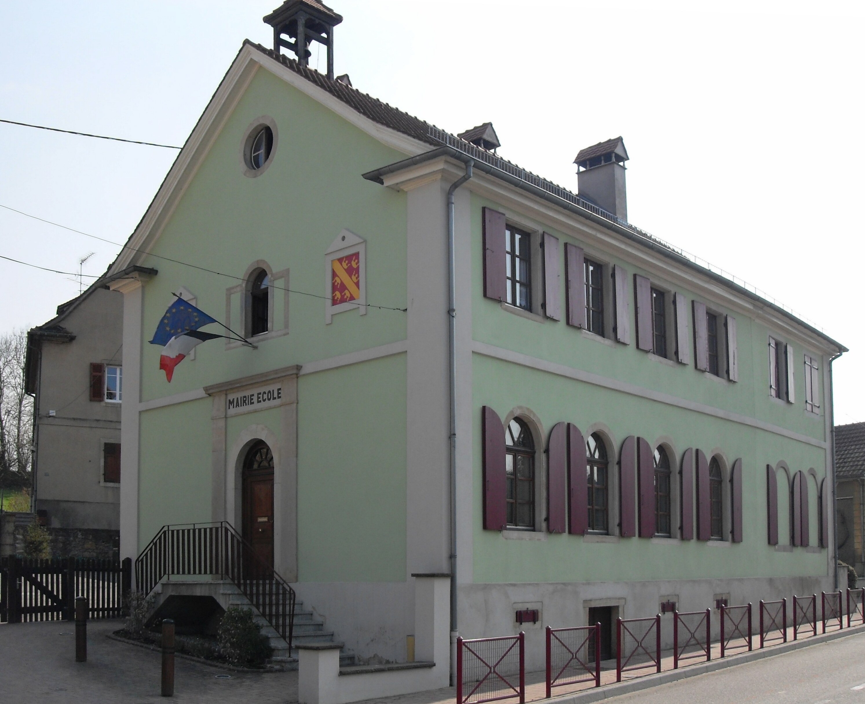 La mairie-école de Kœtzingue